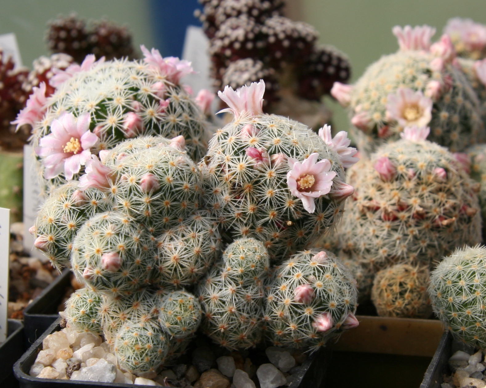 Mammillaria schiedeanasubsp. gisela